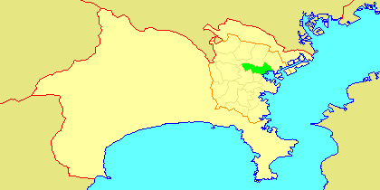 Map of Kanagawa-ku, Yokohama, Kanagawa-prefecture, Japan